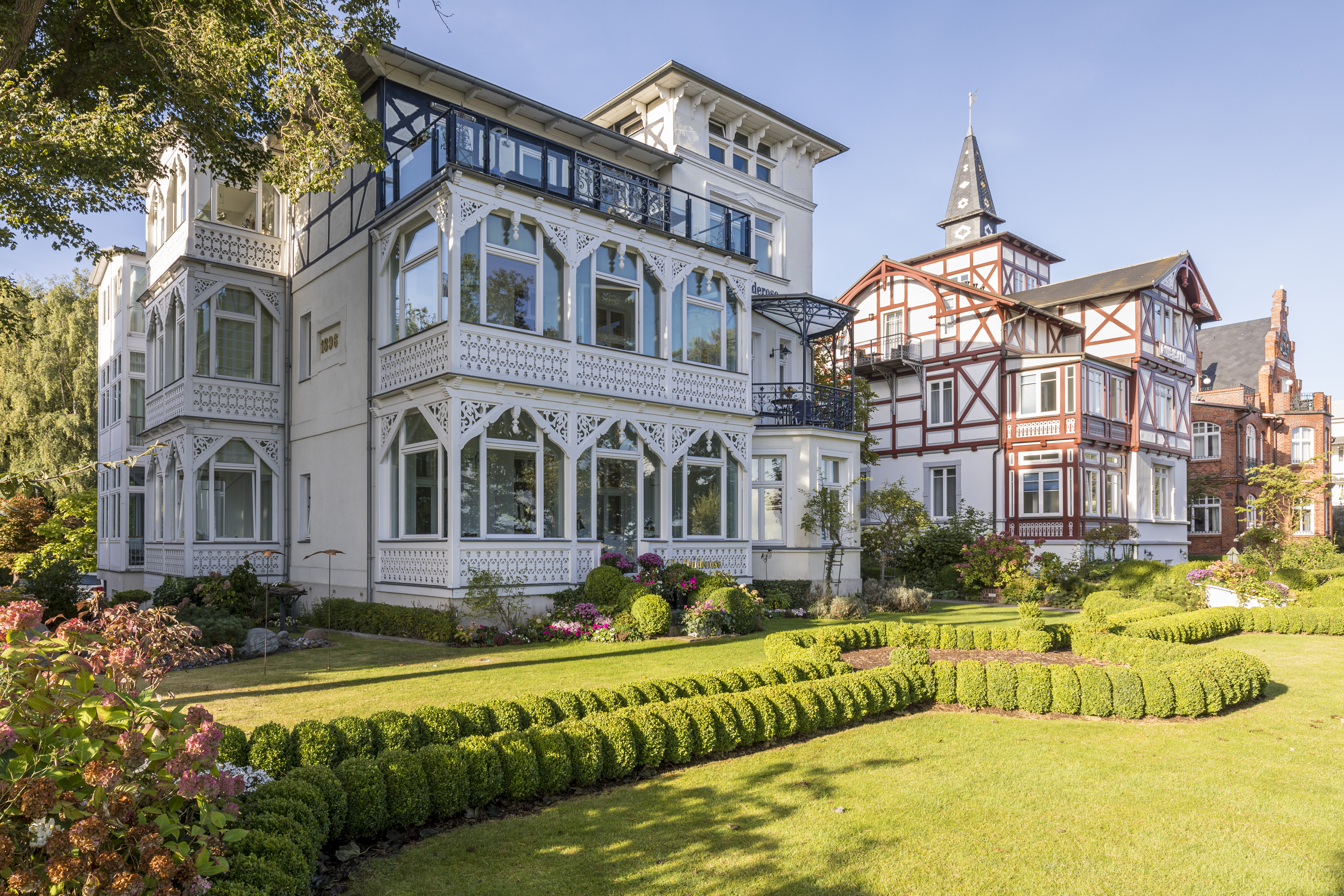 Bäderarchitektur an der Standpromenade Binz